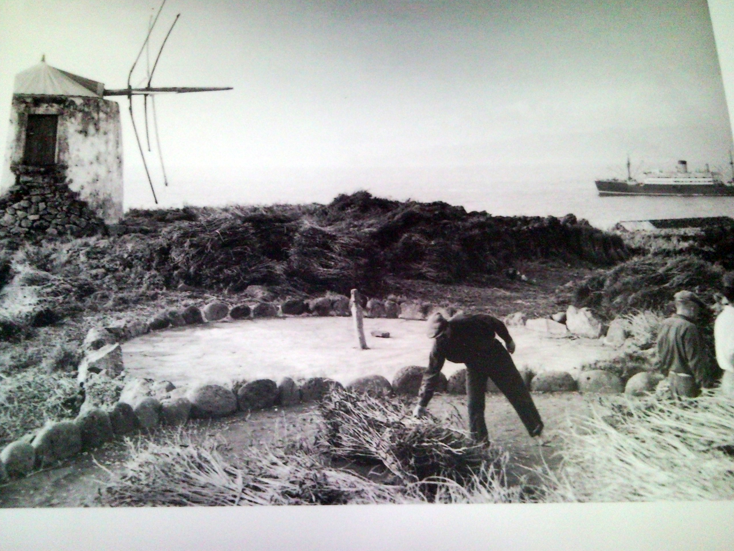 Corvo, início do Séc, XX, eiras, Arquivo de Villa Maria, Angra do Heroísmo, ilha Terceira, Açores